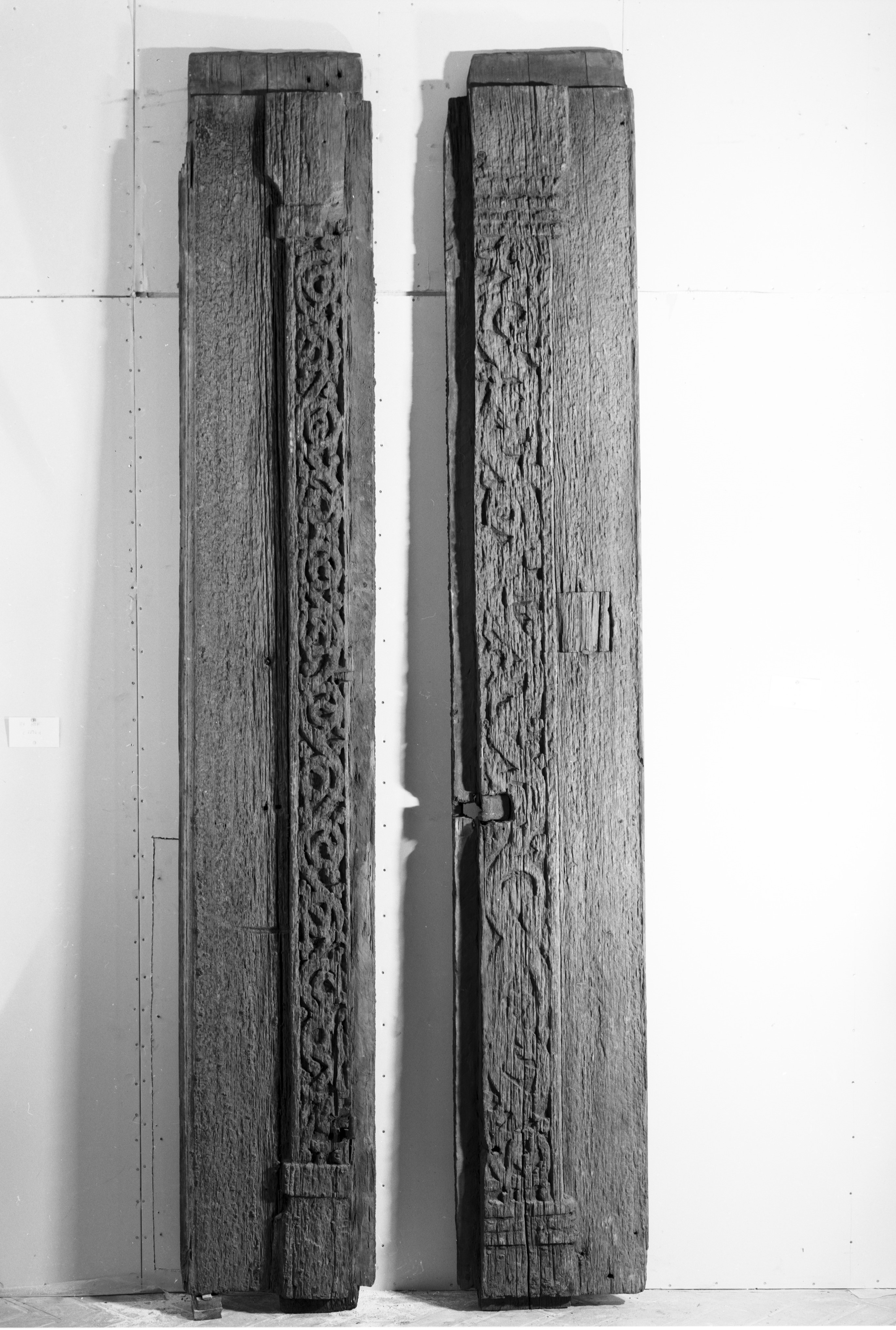 Portalplanker fra den såkalte portal II i gamle Hof kirke i Solør, muligens en stavkirke. Foto: Ove Holst. Fra Kulturhistorisk museums samling i Unimus (jf. [Jf. søk]). Museumsnummer: C2806.